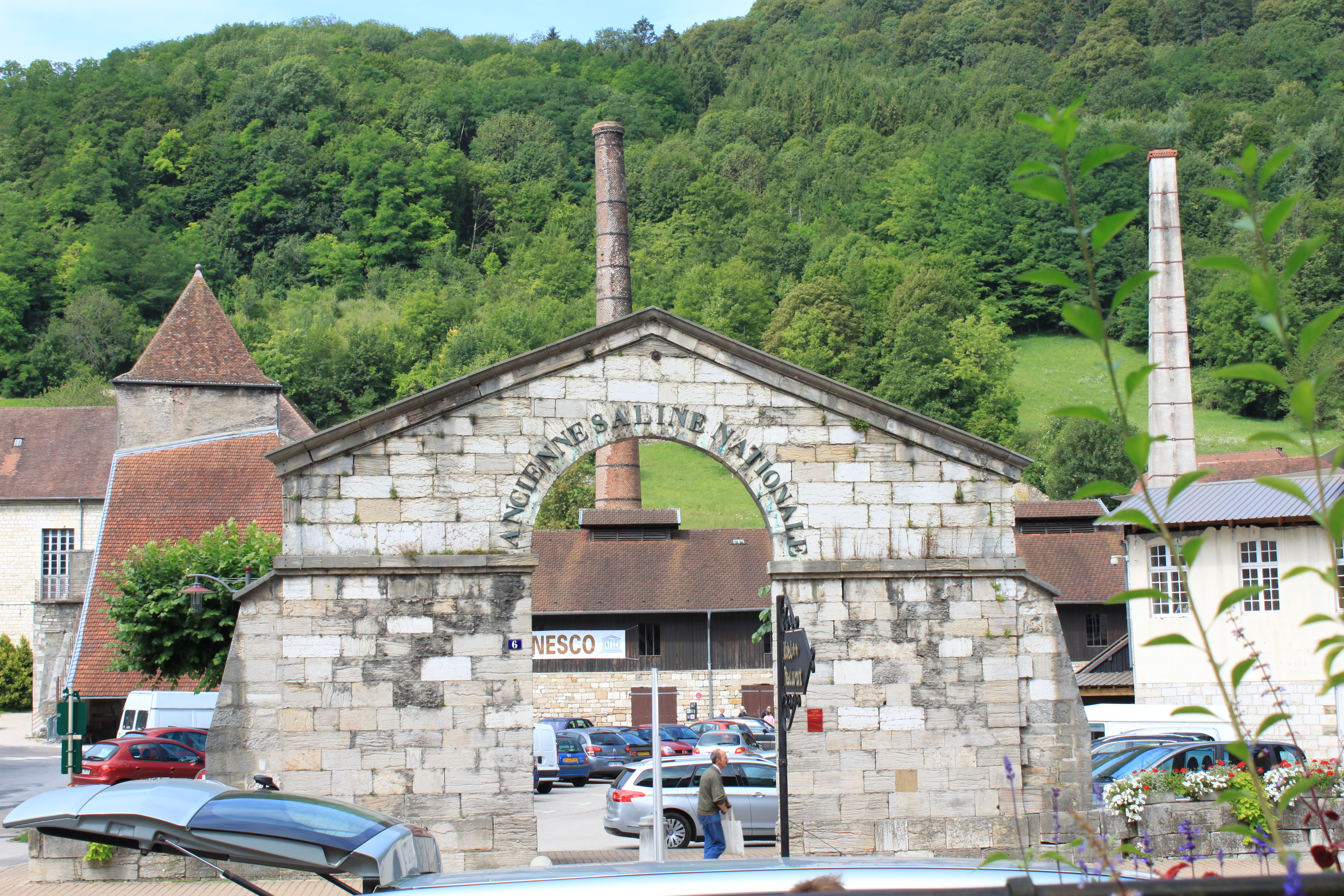 Saline de Salins-les-Bains, Jura, France